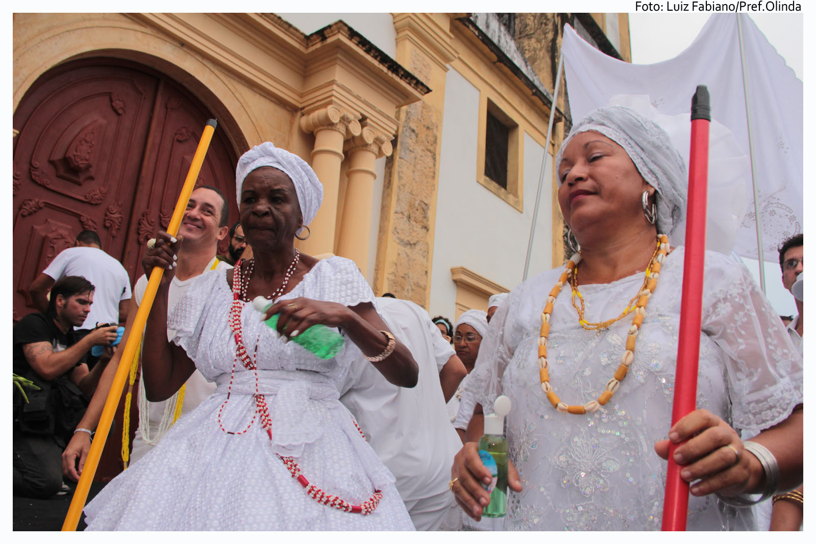 Neste domingo (12), aconteceu a lavagem do Adro da Igreja da Sé, a partir das 16h. A cerimônia, realizada pelo Afoxé Ará Odé com o apoio da Prefeitura de Olinda, acontece há 31 anos como uma forma de reverenciar os ancestrais e pedir proteção para o Carnaval que está chegando. A cerimônia está sendo realizada na Igreja da Sé, pois a Igreja do Bonfim está interditada para reforma. O ritual, comandado pelo babalorixá Tata Raminho de Oxóssi, fundador do Afoxé Ara Odé em 1982, começa na Igreja da Sé, onde é feita a lavagem do adro (terreno em frente ao templo religioso) com águas perfumadas e pombos brancos são soltos, simbolizando a paz. A prática é um exemplo do sincretismo religioso presente na cultura pernambucana, pois reúne ao mesmo tempo elementos da religião afro e do catolicismo. Após a lavagem, o grupo, formado por mulheres vestidas com longas saias brancas rodadas, portando jarras perfumadas por flores brancas e percussionistas, sai em direção ao Centro de Raminho, que fica em Jardim Brasil. O cortejo segue o seguinte percurso: Ladeira da Sé, Rua do Bonfim, Ladeira da Misericórdia, Quatro Cantos, Rua do Amparo, Largo do Amparo, Rua do Guadalupe, Rua José Ramalho, Av. Carmela Dutra e Rua Angelina Guimarães Silva (antiga Rua São Paulo). Lavagem do Adro da Igreja da Sé traz proteção para o Carnaval Foto: Luiz Fabiano/Pref.Olinda